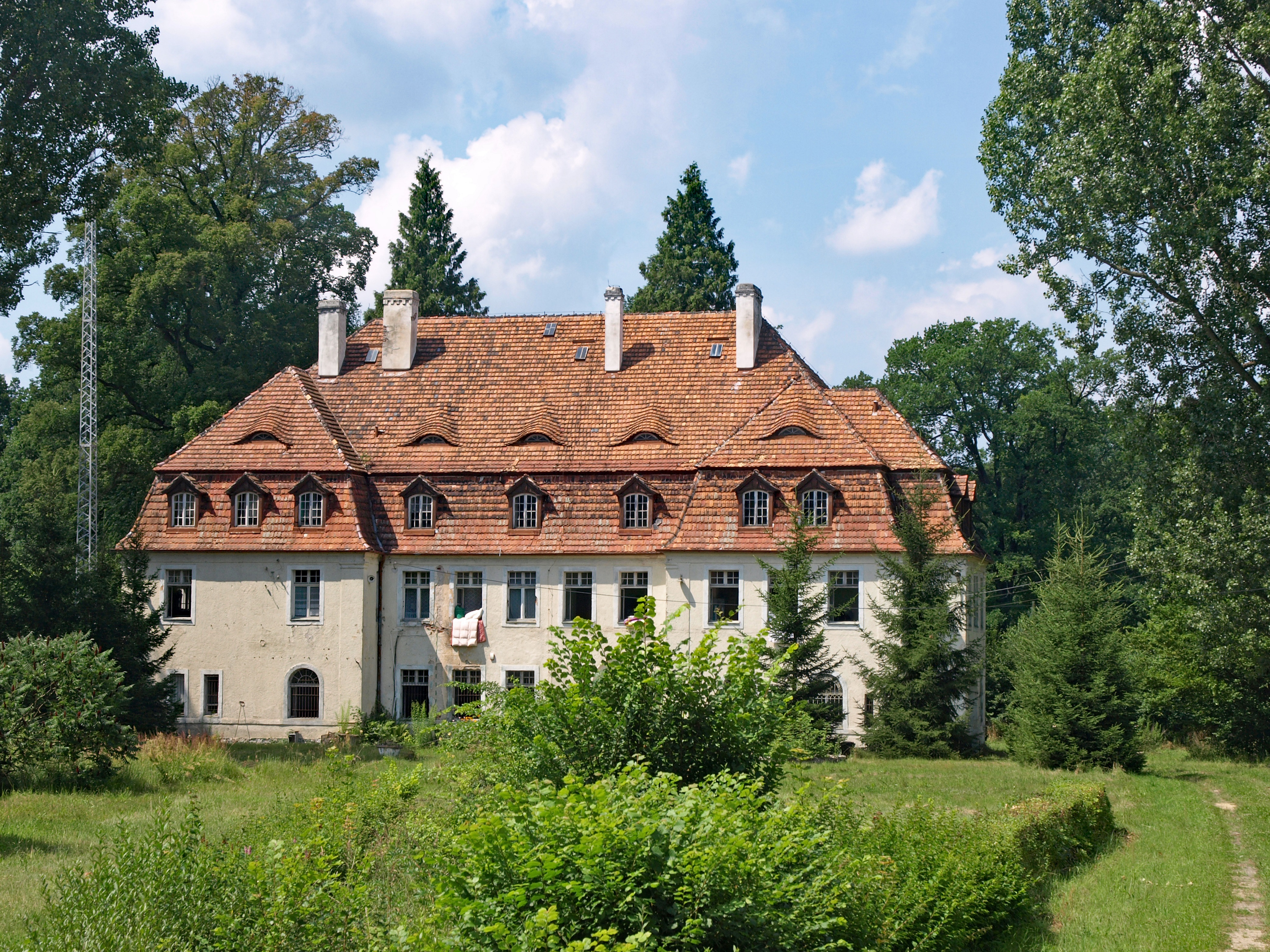 Schloss Zoblitz (Sobolice)